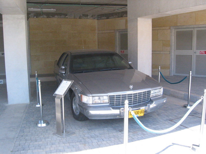 Yitzhak Rabin Center, Tel Aviv